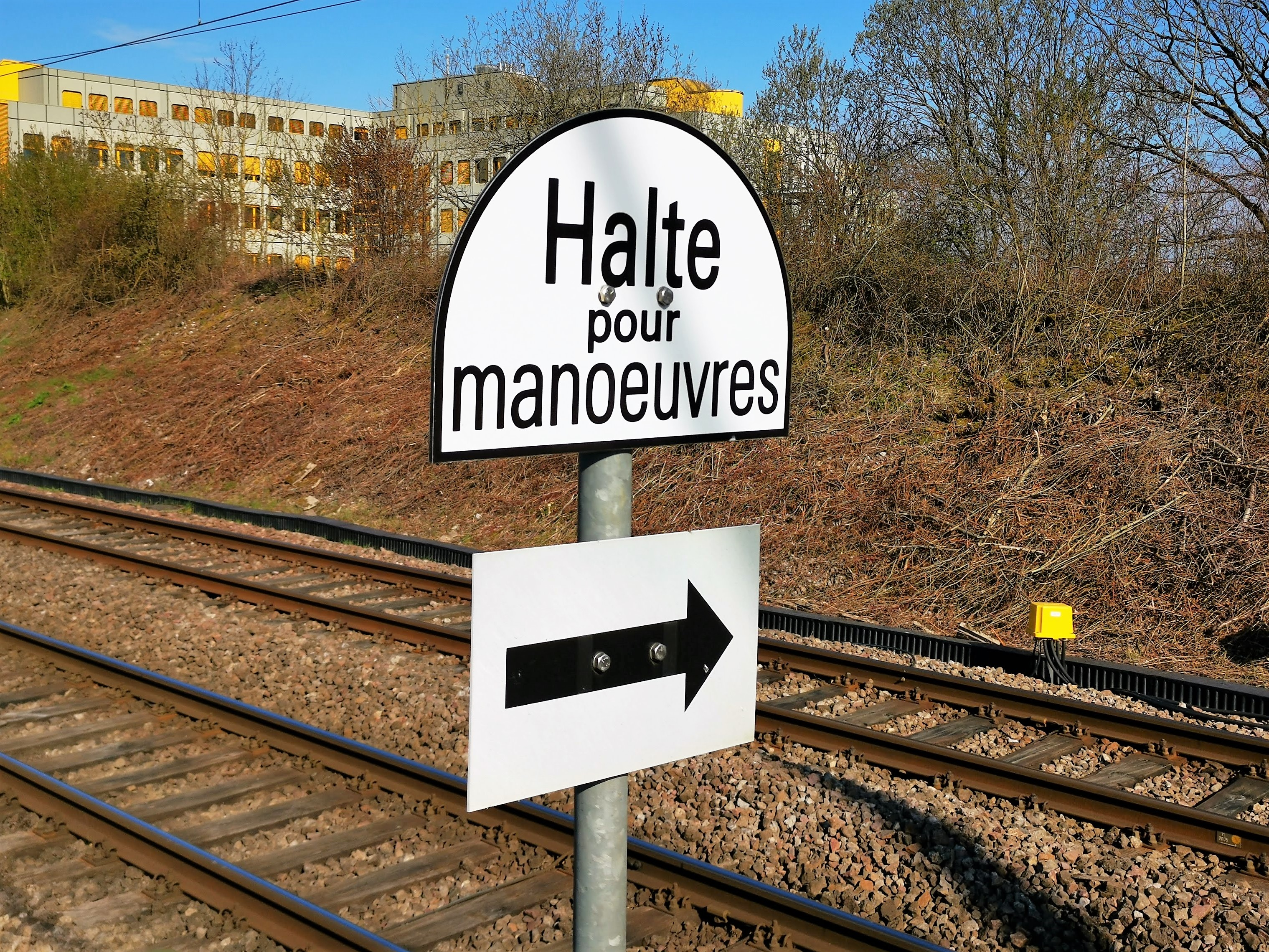 Luxembourg-Gasperich, gare de Hollerich. Signalisation "Halte pour manoeuvres".